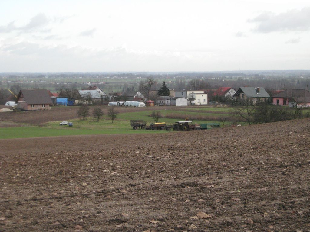 Widok na część Górnej Białej (gmina Chojnów)